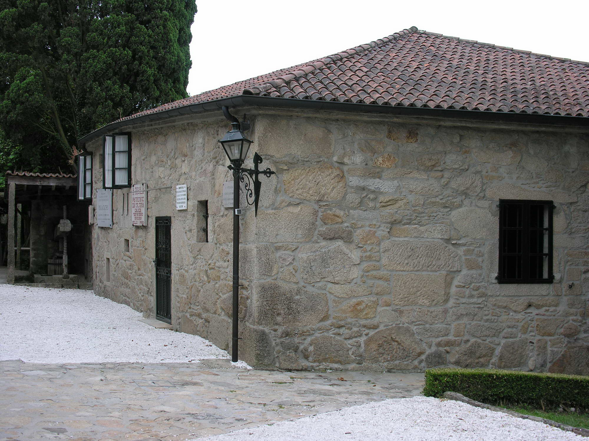 Casa da Matanza, casa de Rosalía de Castro, Padrón, Galicia Publish by= Luis Miguel Bugallo Sánchez.